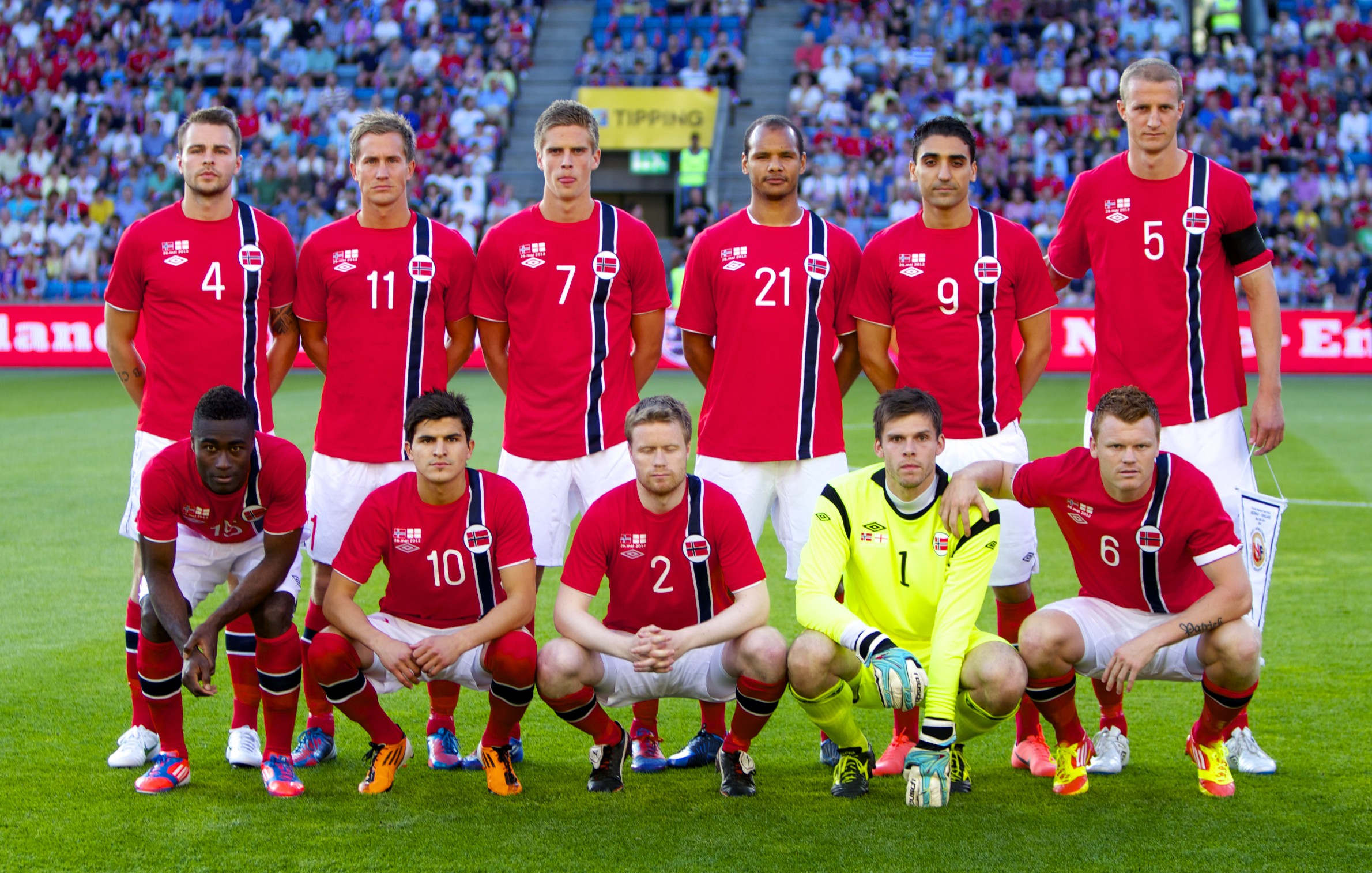 Starting lineup for Norway against England, 26 May, 2012. Front row: 15 Alexander Tettey, 10 Tarik Elyounoussi, 2 Tom Hogli, 1 Rune Jartsein, 6 John Arne Riise Back row: 4 Vadim Demidov, 11 Morten Gamst Pedersen, 7 Markus Henriksen, 21 Daniel Braaten, 9 Mohammed Abdellaoue, 5 Brede Hangeland